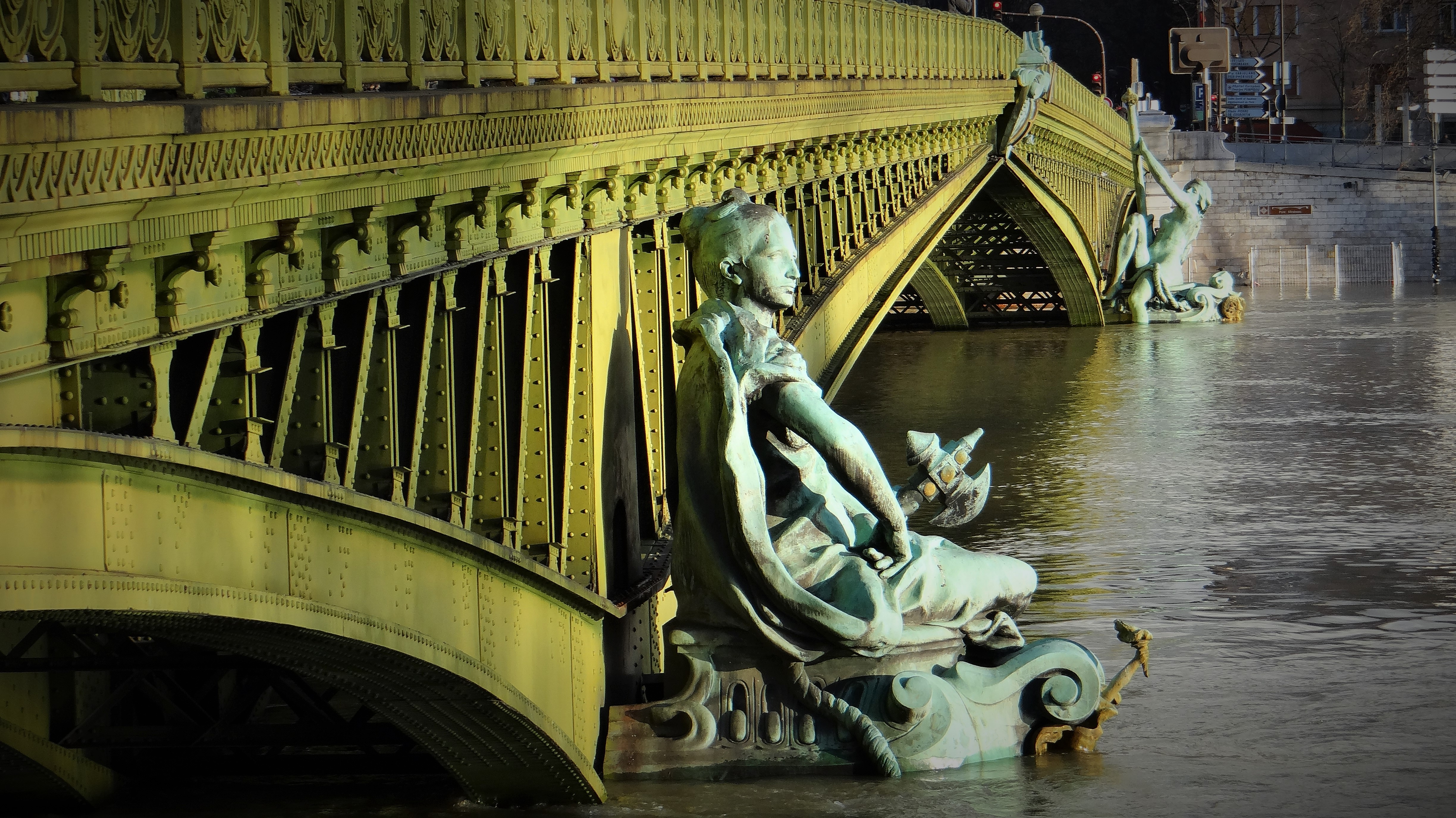 Crue de la Seine au Pont Mirabeau, janvier 2018 .